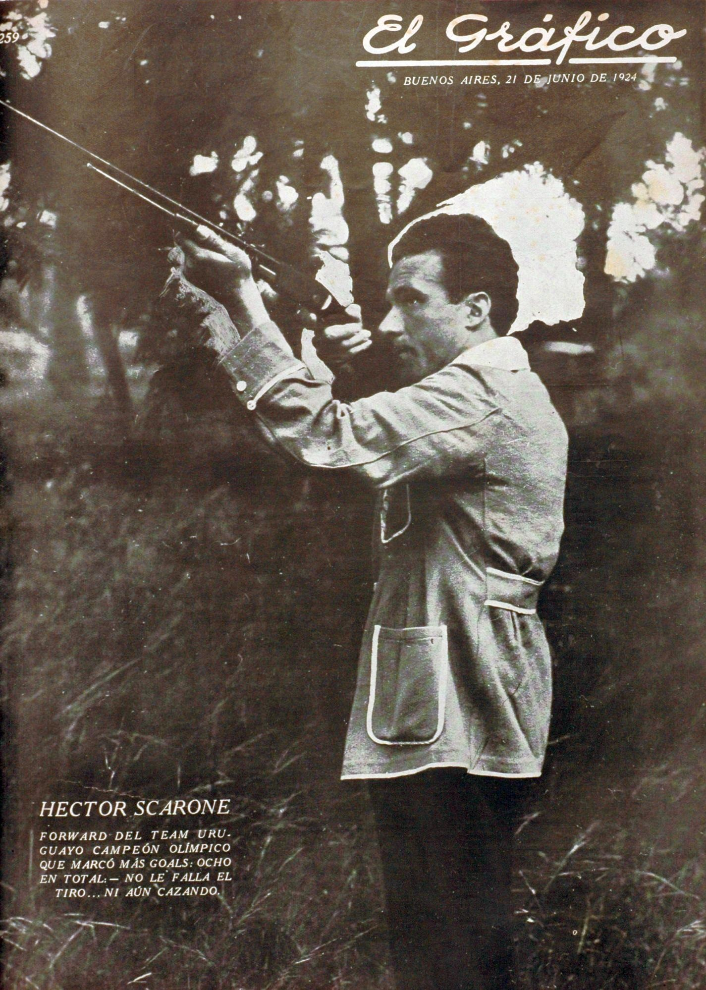 El Grafico del 21 de Junio de 1924. Edicion 259